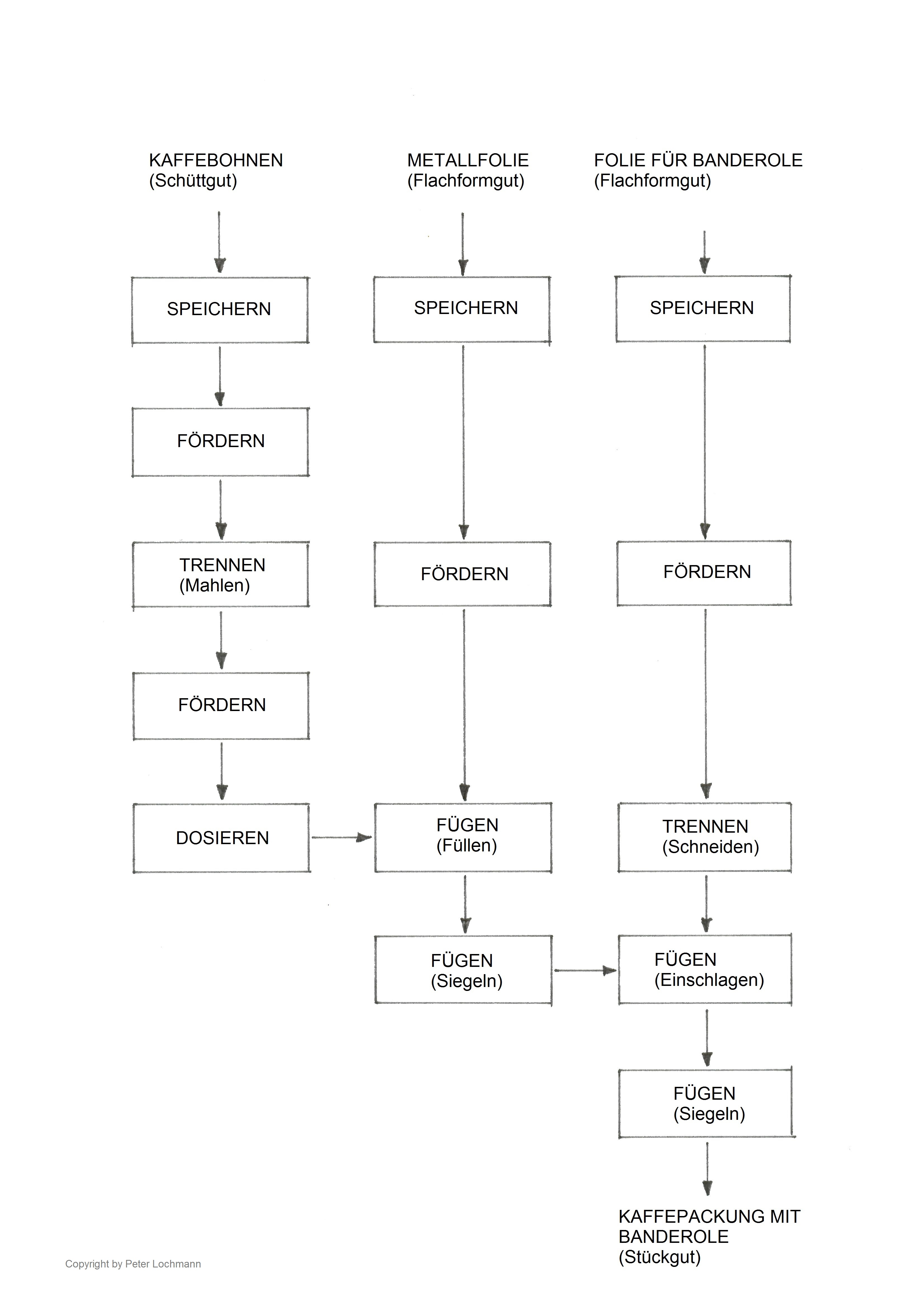 Dieses innermaschinelle Verfahren beschreibt in schematischer Form die Abfolge der einzelnen Funktionen zur Verarbeitung von Kaffebohen und Verpackung von Kaffepulver.